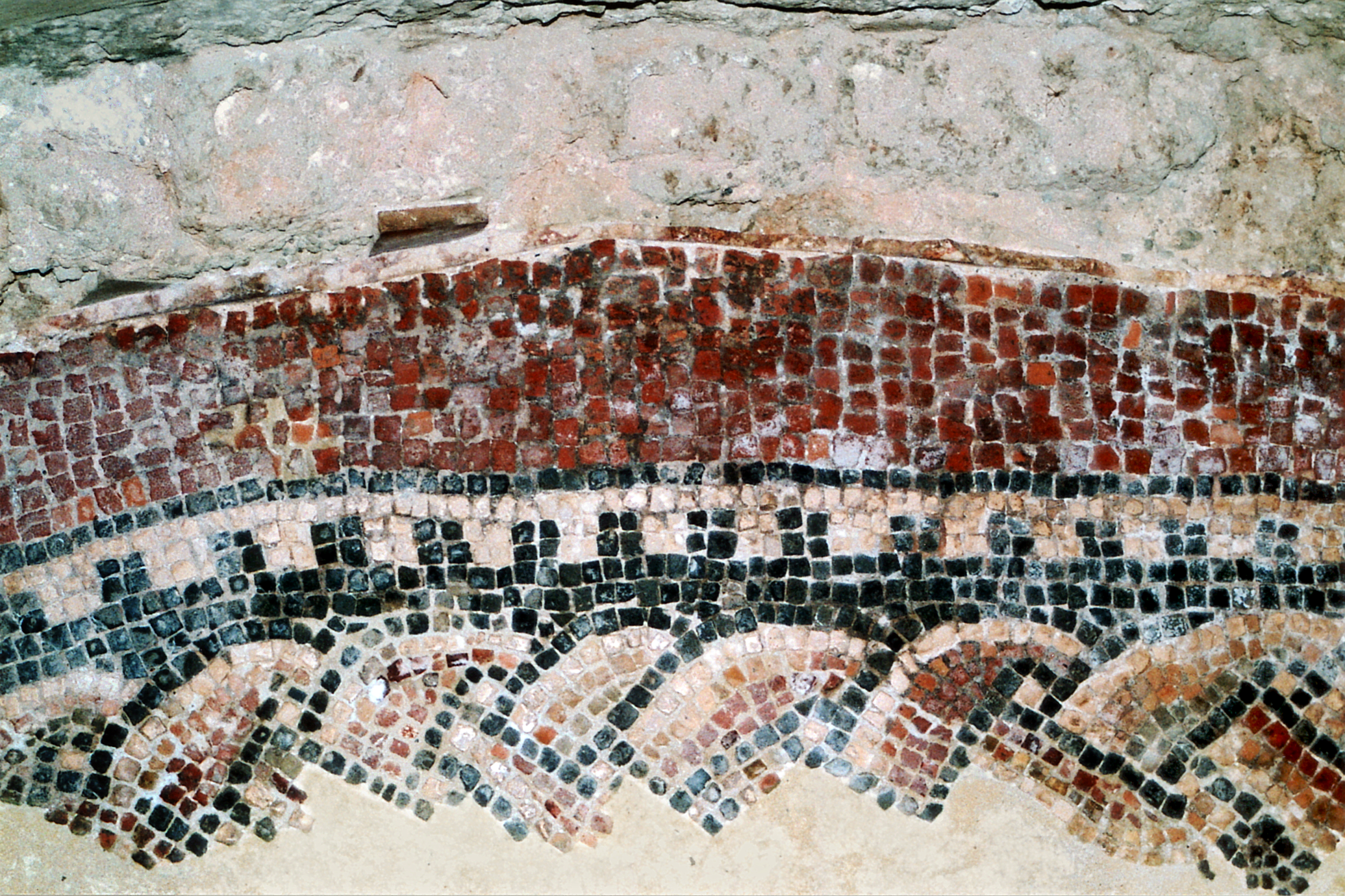 Letzter sichtbar, in situ erhaltener Rest des spätantiken Fußbodenmosaiks in der Kölner Kirche St. Gereon. Photographiert mit einer Minolta X 700, einem Tokina 28-70-mm-Objektiv und dem Metz mecablitz 32 CT3 (System SCA 300)